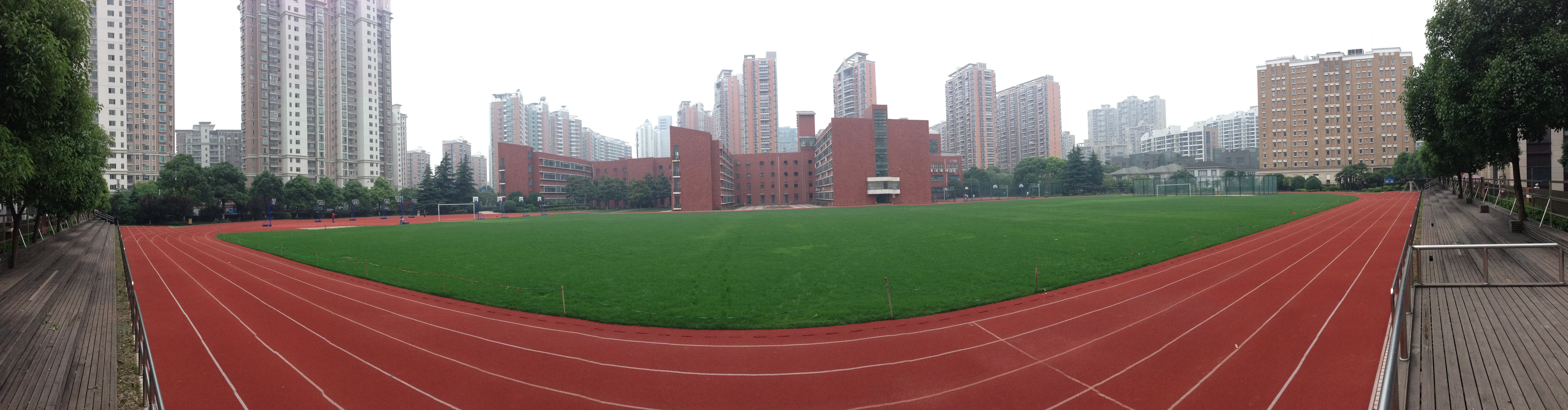 上海市进才实验中学 2013年6月12日